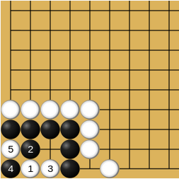 (Étape 1) Exemple de vie et mort dans les coins au jeu de go